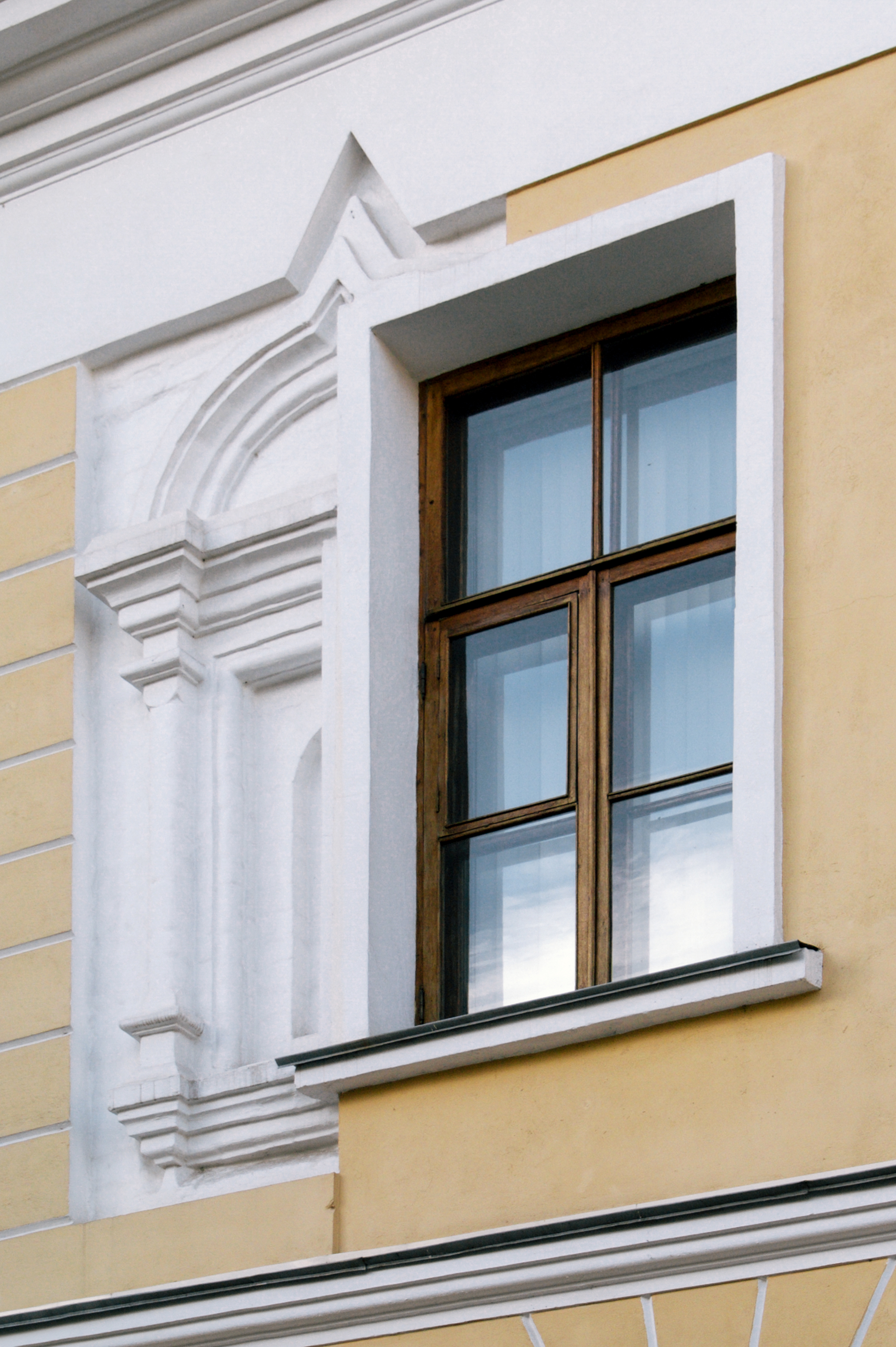 Дом: Знаменский М. пер., дом 3/5, строение 4, Хамовники, Центральный округ, Москва